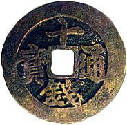 십전통보